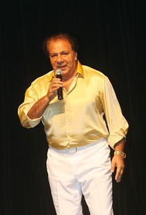 Fotógrafo Henrique Matos